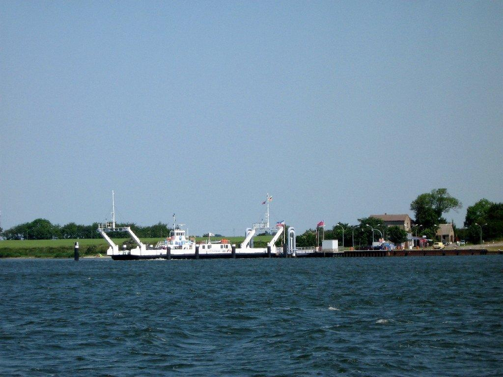 Autofähre über den Strelasund, von Stahlbrode auf dem Festland nach Glewitz auf Rügen. Die Fährverbindung wird mit zwei Schiffen betrieben.